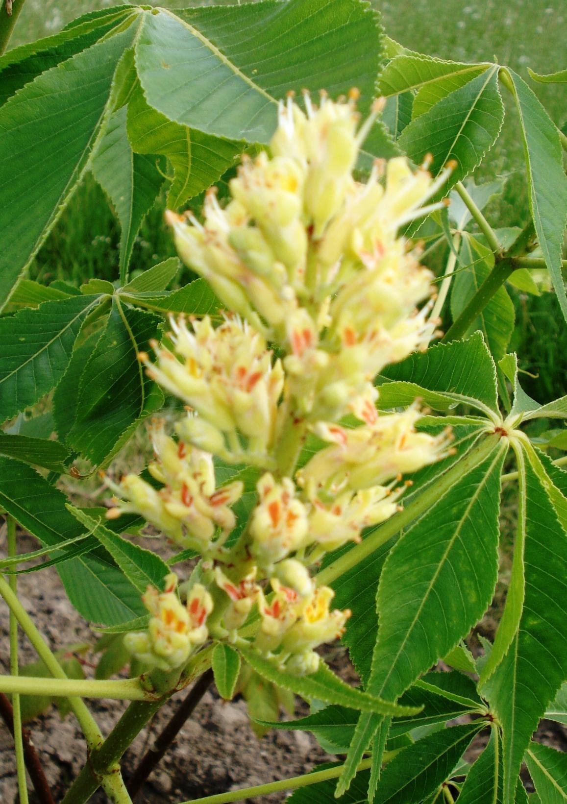 Aesculus flava - blossom and leaves